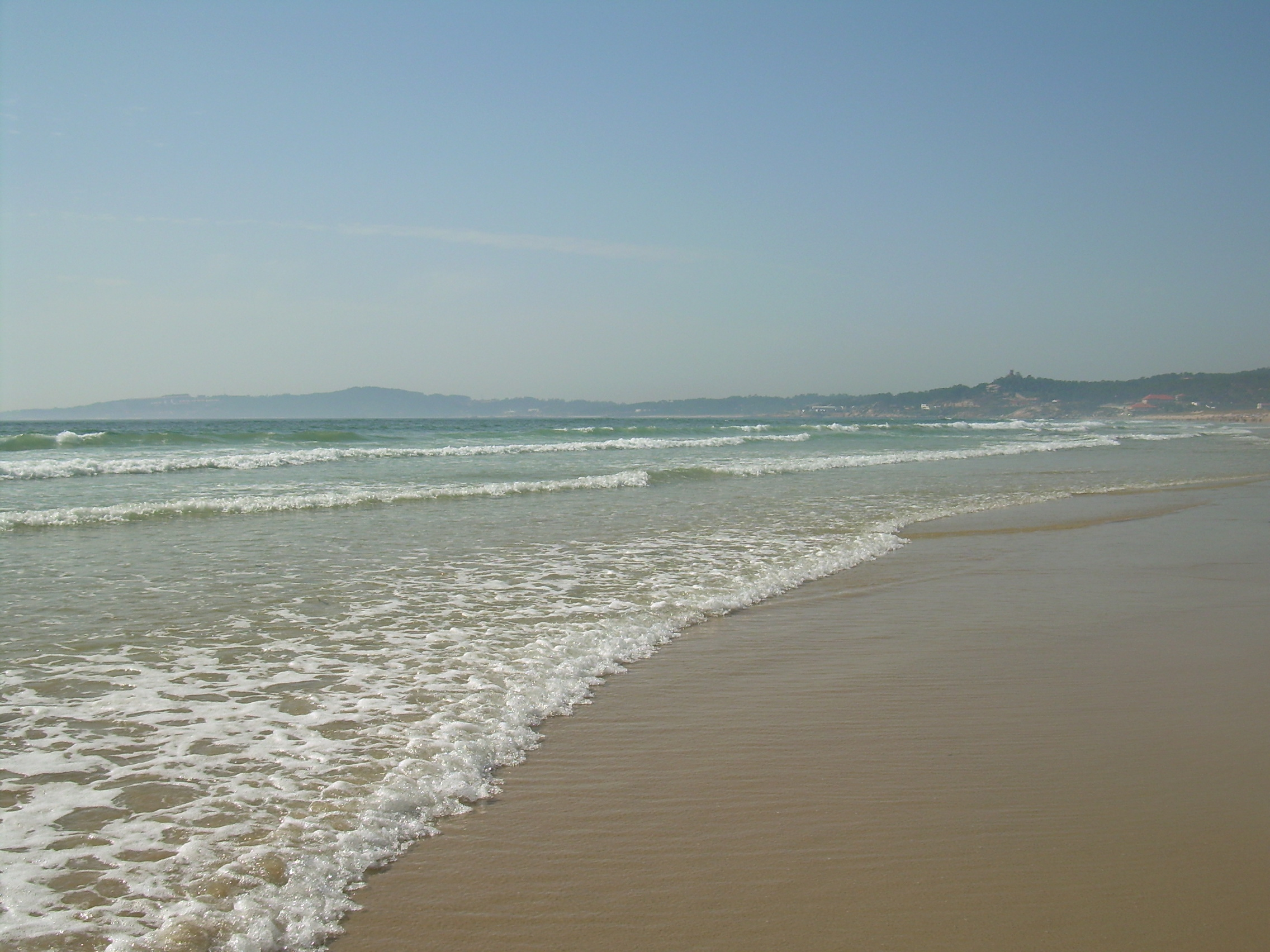 Playa de la Lanzada en Galicia. Pontevedra (Sanxenxo)